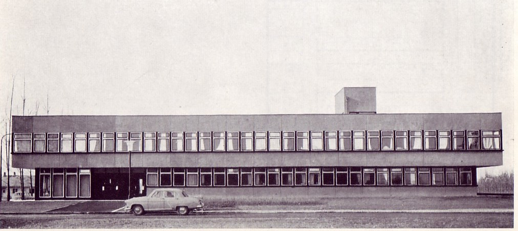 Nyírségi mezőgazdasági kutató intézet főépülete, Nyíregyháza (tervezte Rimanóczy Jenő, 1963-1966). Nem összekeverendő a hasonló Nyírségi mezőgazdasági kutatóintézet, növényház épülettel!